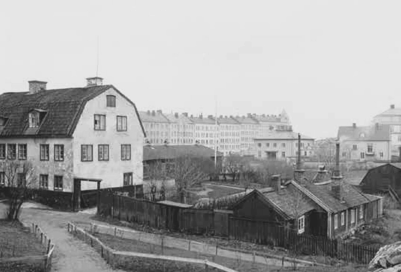 Hus nummer 2 på Yttersta Tvärgränd (kv. Kaninen minsta)